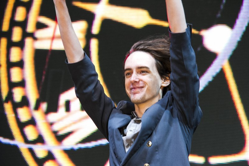 Tecnópolis,sábado 12 de abril de 2014 - Como parte del Encuentro Federal de la Palabra, se llevó a cabo “Spinetta y el lenguaje del cielo”, un homenaje a Luis Alberto Spinetta. El concierto fue organizado por el Plan Nacional Igualdad Cultural –una iniciativa del Ministerio de Planificación Federal, Inversión Pública y Servicios de la Nación y la Secretaría de Cultura de la Presidencia de la Nación–, junto con el músico y productor Lito Vitale. Del concierto participaron las bandas y solistas Eruca Sativa, Drear Mar I, Palo Pandolfo, Willy Crook, Nico Cota, Rayos Láser, Gonzalo Aloras, Javier Malosetti, Isabel de Sebastián, Rosal, Bersuit Vergarabat, Benito Cerati, Candela Cibrián y Aqualactica, Huevo, Guillermo Beresñak, Luna y Mateo Sujatovich. Fueron acompañados por una banda de músicos de primer nivel, algunos de ellos, exintegrantes de bandas de Spinetta, como el baterista Jota Morelli , el guitarrista Guillermo Arrom y Leo Sujatovich en teclados. Además, la actriz Virginia Inoccenti, leyó algunos de los poemas escritos por Spinetta. El Encuentro Federal de la Palabra, que se realiza hasta el 20 de abril en Tecnópolis, reflexiona sobre narrativa y poesía, teatro, cine, canción, radio y TV, culturas digitales, periodismo, humor gráfico e historietas y jóvenes de la Patria Grande. Las actividades, organizadas por la Presidencia de la Nación, cuentan con la participación de todas las provincias del país.